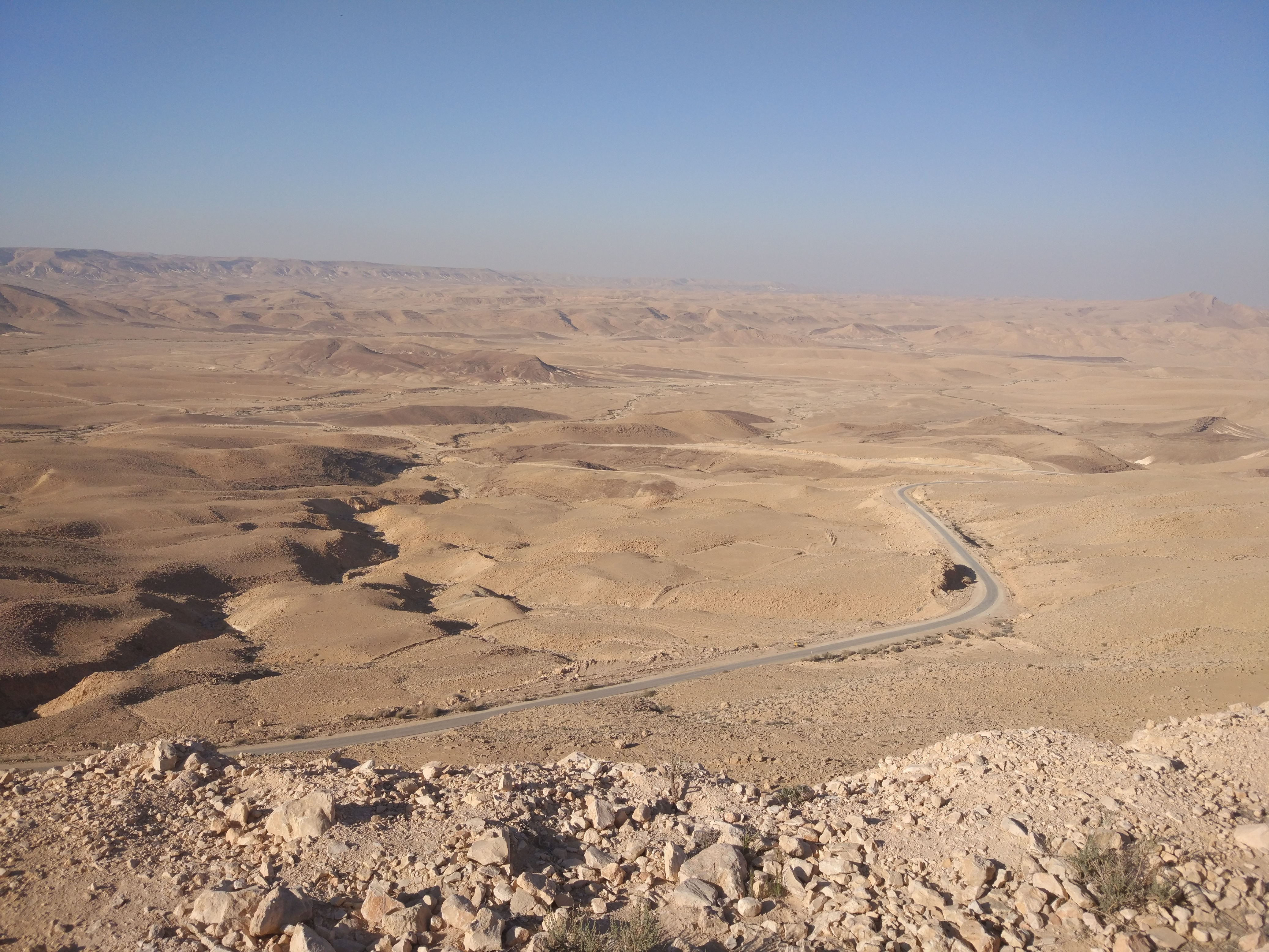 כביש 10 ממצפור הר שגיא